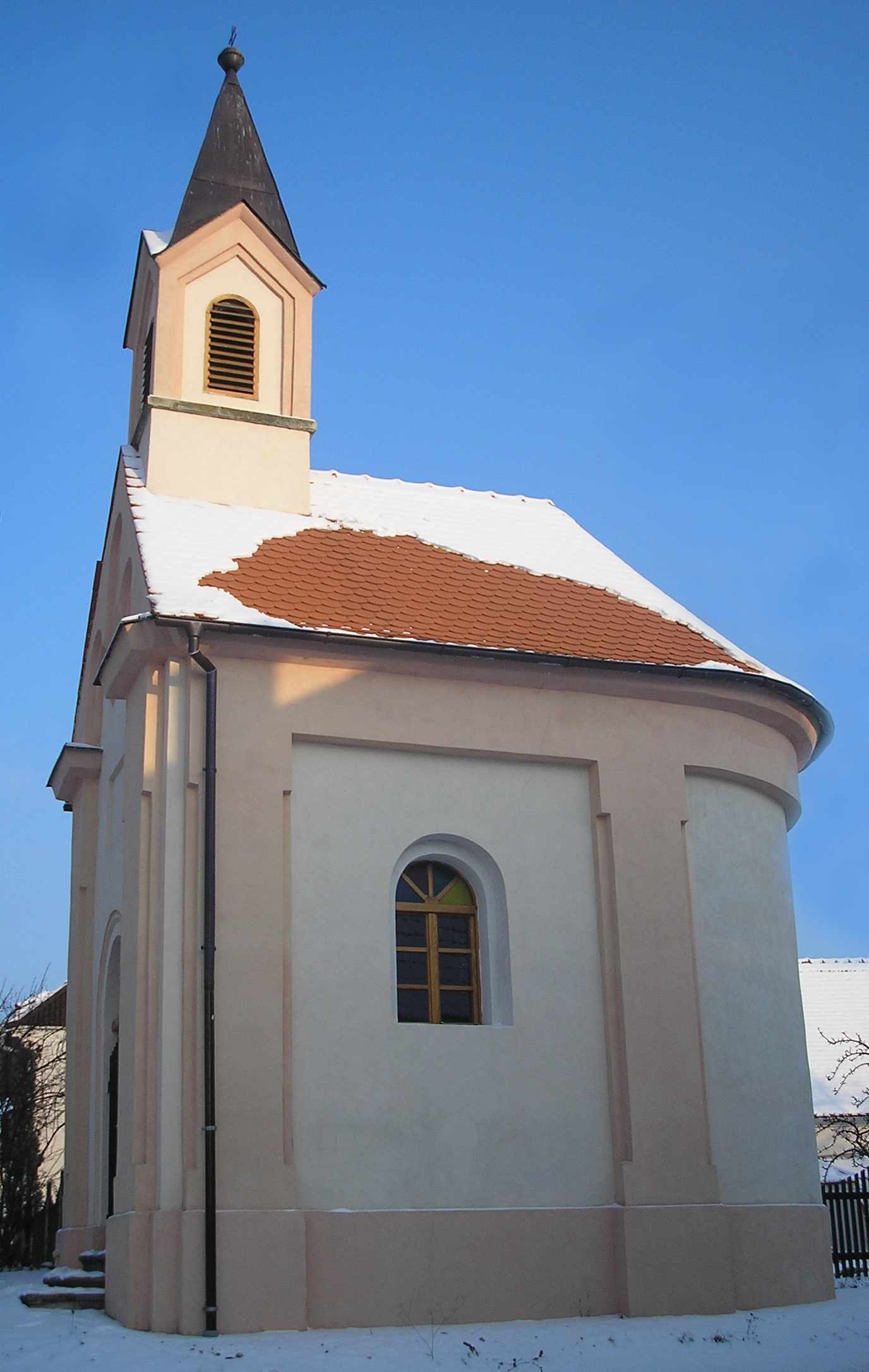 Pohled na kapli svatého Cyrila a Metoděje